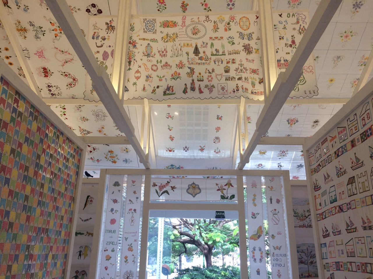 Vista do interior da exposição "A Casa Bordada".